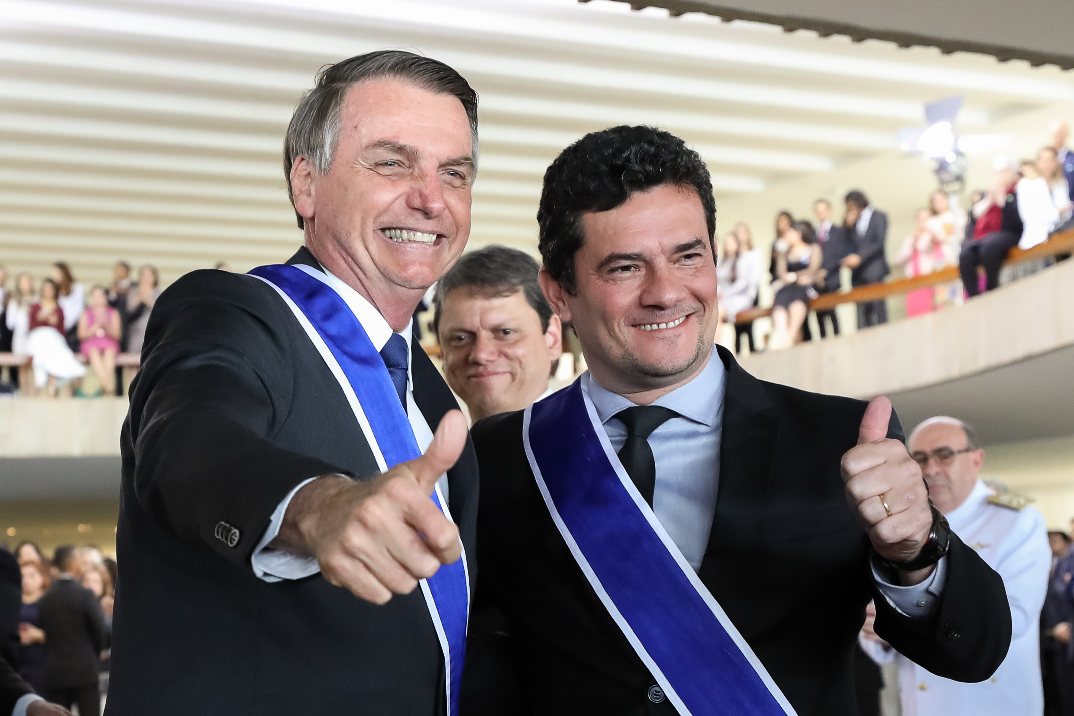 (Brasília - DF, 03/05/2019) Presidente da República, Jair Bolsonaro durante Cerimônia de Imposição de Insígnias da Ordem do Rio Branco. Foto: Marcos Corrêa/PR